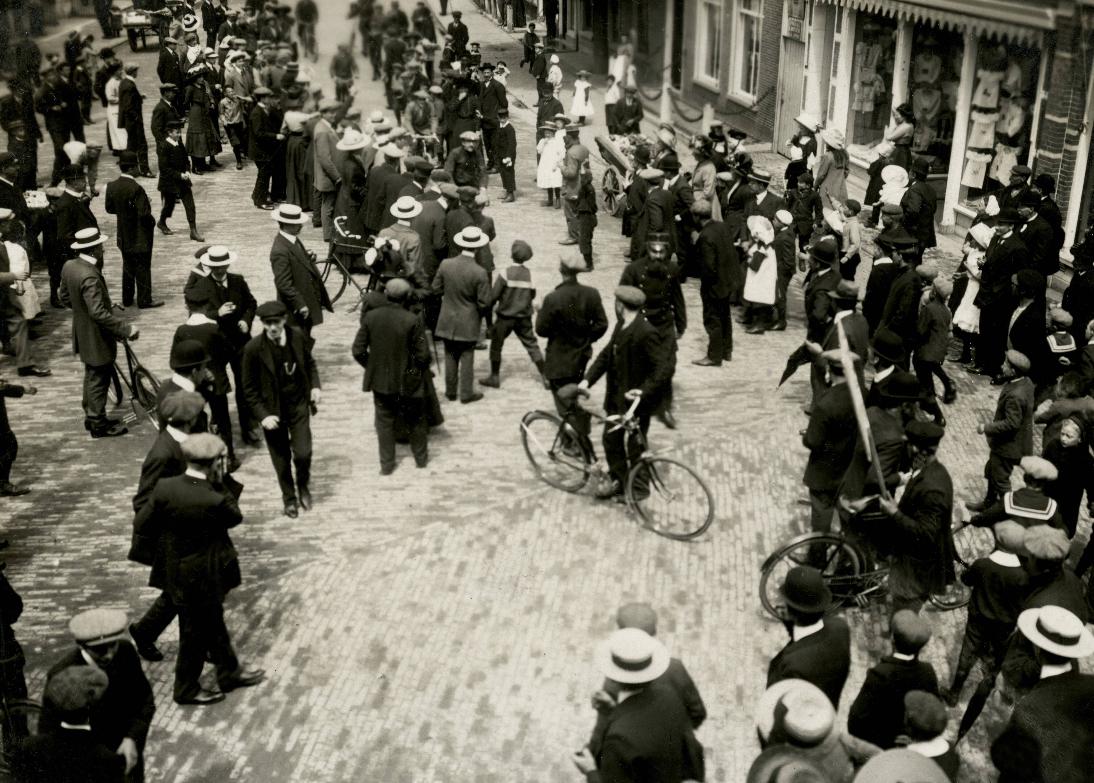 Wielrennen, Historie. De Elfstedentocht per fiets. Binnenkomst van de deelnemers in Sneek, Friesland, Nederland, Juni 1912.